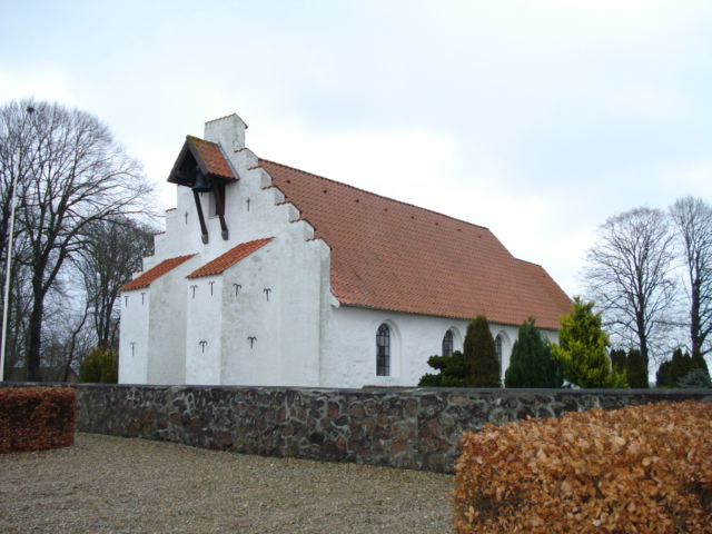 Hvilsted Church at Århus, Denmark